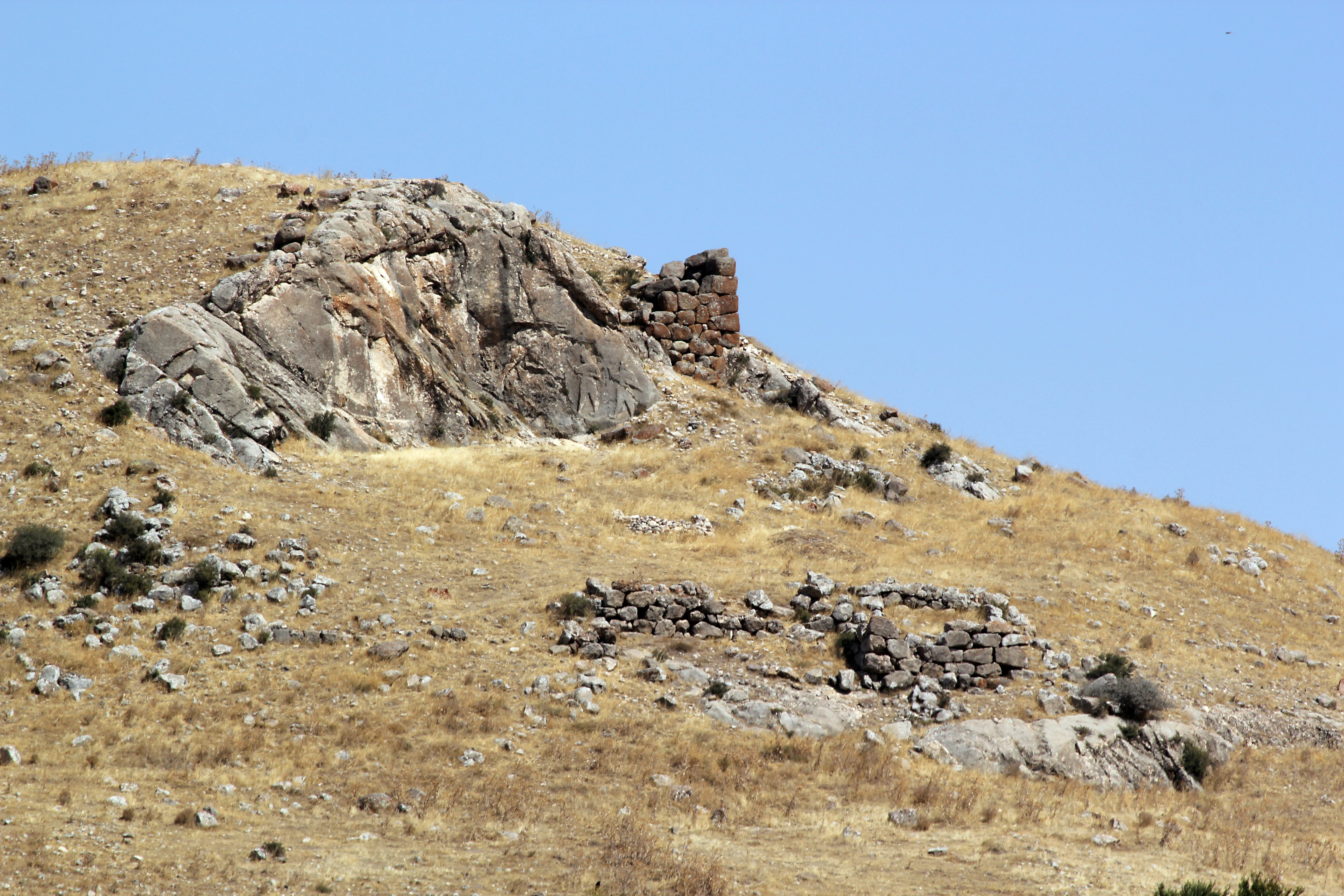 Gavurkale, hethitisches Felsrelief bei Haymana, Zentraltürkei, südlich von Ankara, Reliefs und Befestigungsmauern